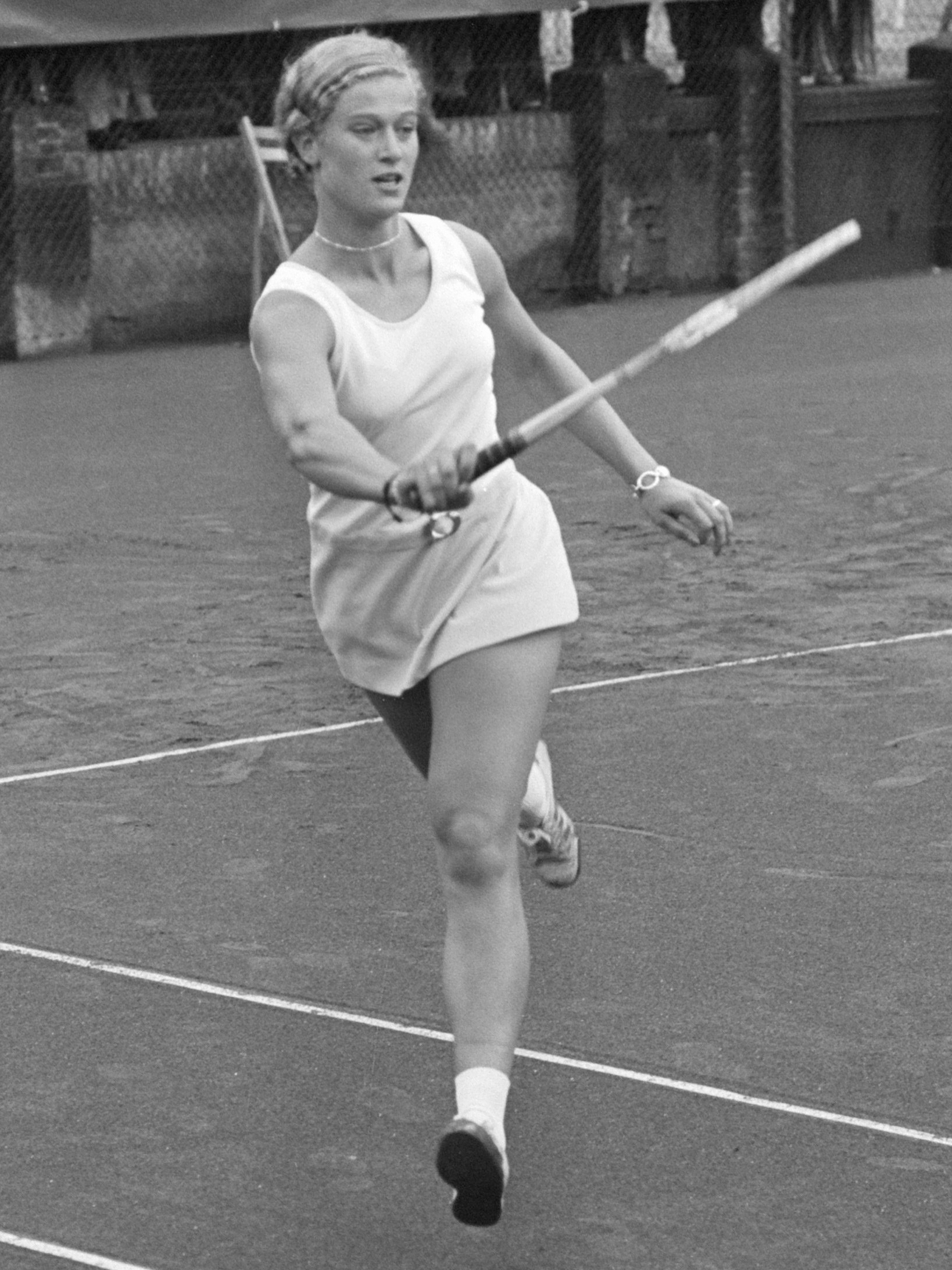 Internationale tenniskampioenschappen Melkhuisje; Elly Appel in actie 17 juli 1974